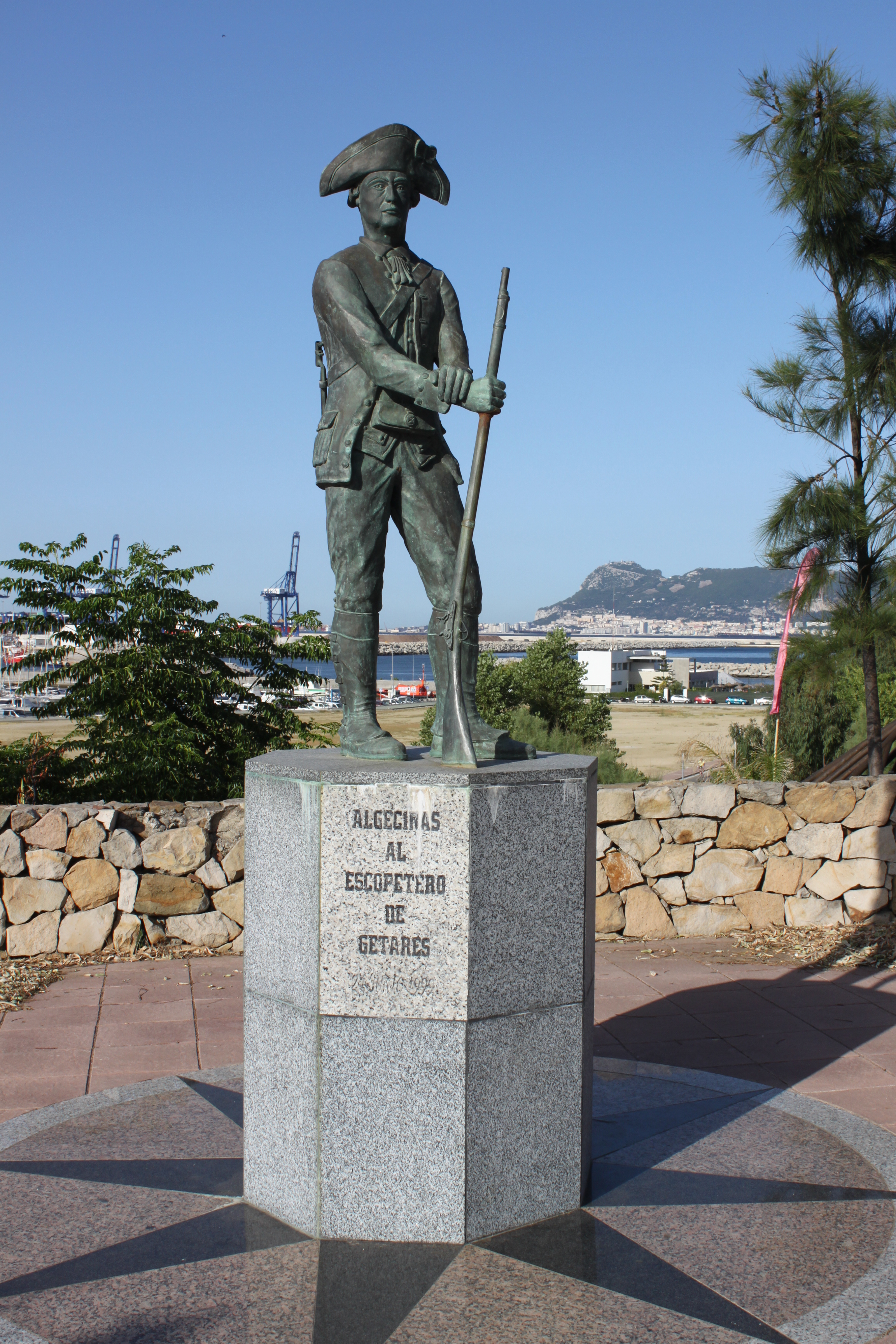 Estatua del Escopetero de Getares situada en la Avenida Carlos Cano de Algeciras, obra de Rafael Gómez de Avellaneda e inaugurada en 1999.